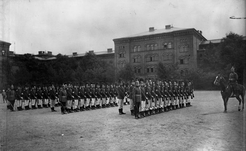 Berlin, Hauptkadettenanstalt, Paradeaufstellung ADN-ZB Aus der Geschichte des deutschen Militarismus Kadetten der kaiserlichen Kadettenanstalt in Berlin Lichterfelde in Paradeaufstellung. (Aufnahme: 1911) [Berlin-Lichterfelde, Preußische Hauptkadettenanstalt]